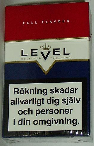 Ett foto av ett Level-cigarettpaket.